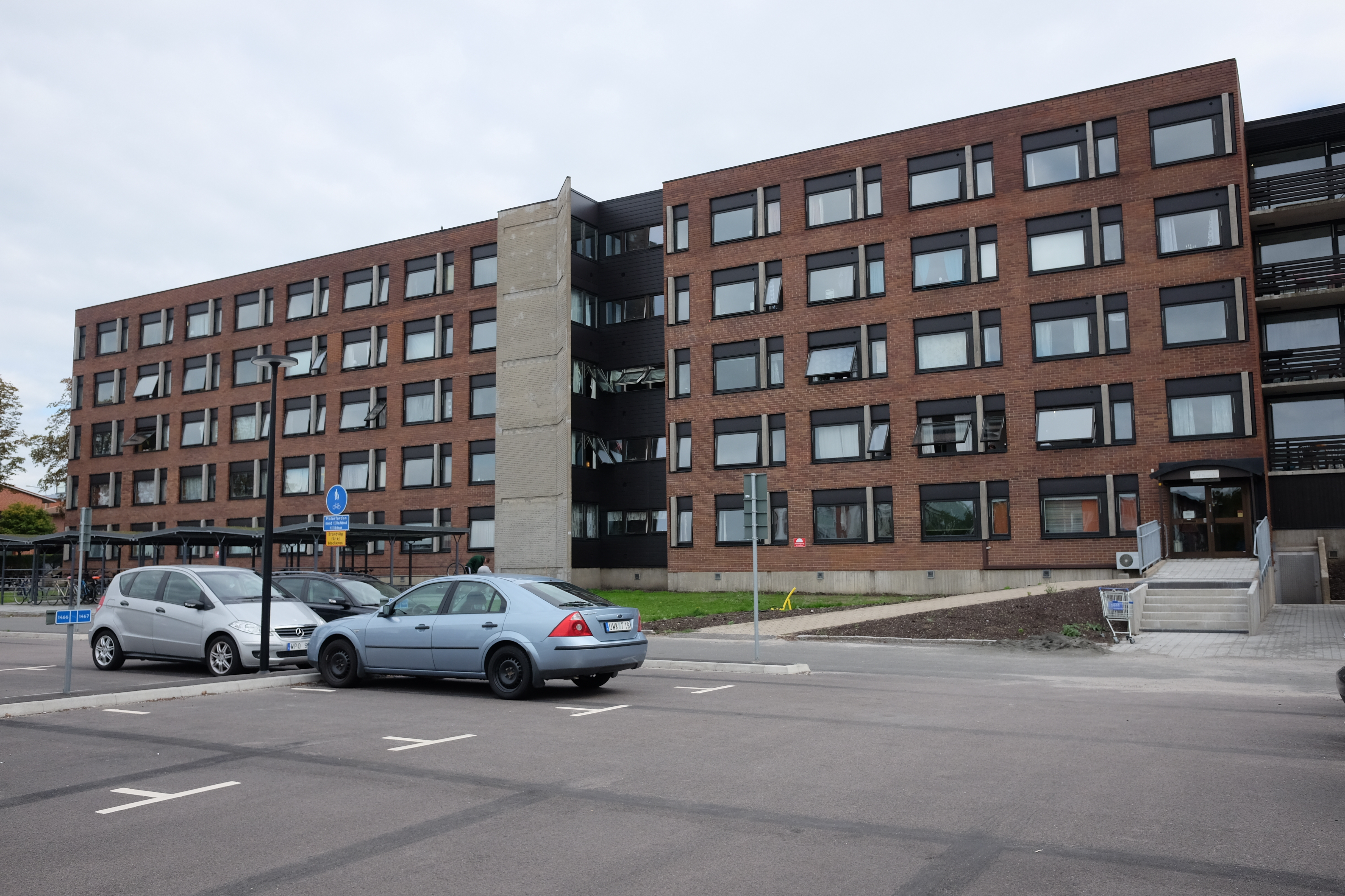 Bostadsområdet Vildanden i Lund.